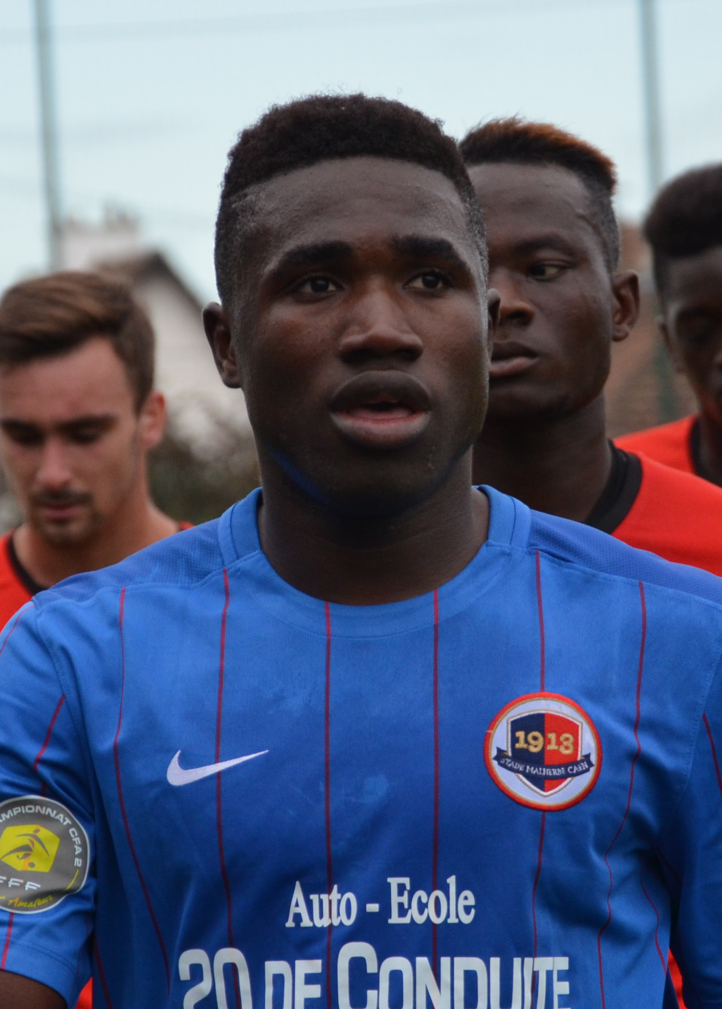 Photographie prise lors d'un match amical opposant les équipes réserves du Stade Malherbe de Caen et du Stade rennais sur l'un des terrains annexes du stade de Venoix le 13 septembre 2015. Ici, Jeff Louis.